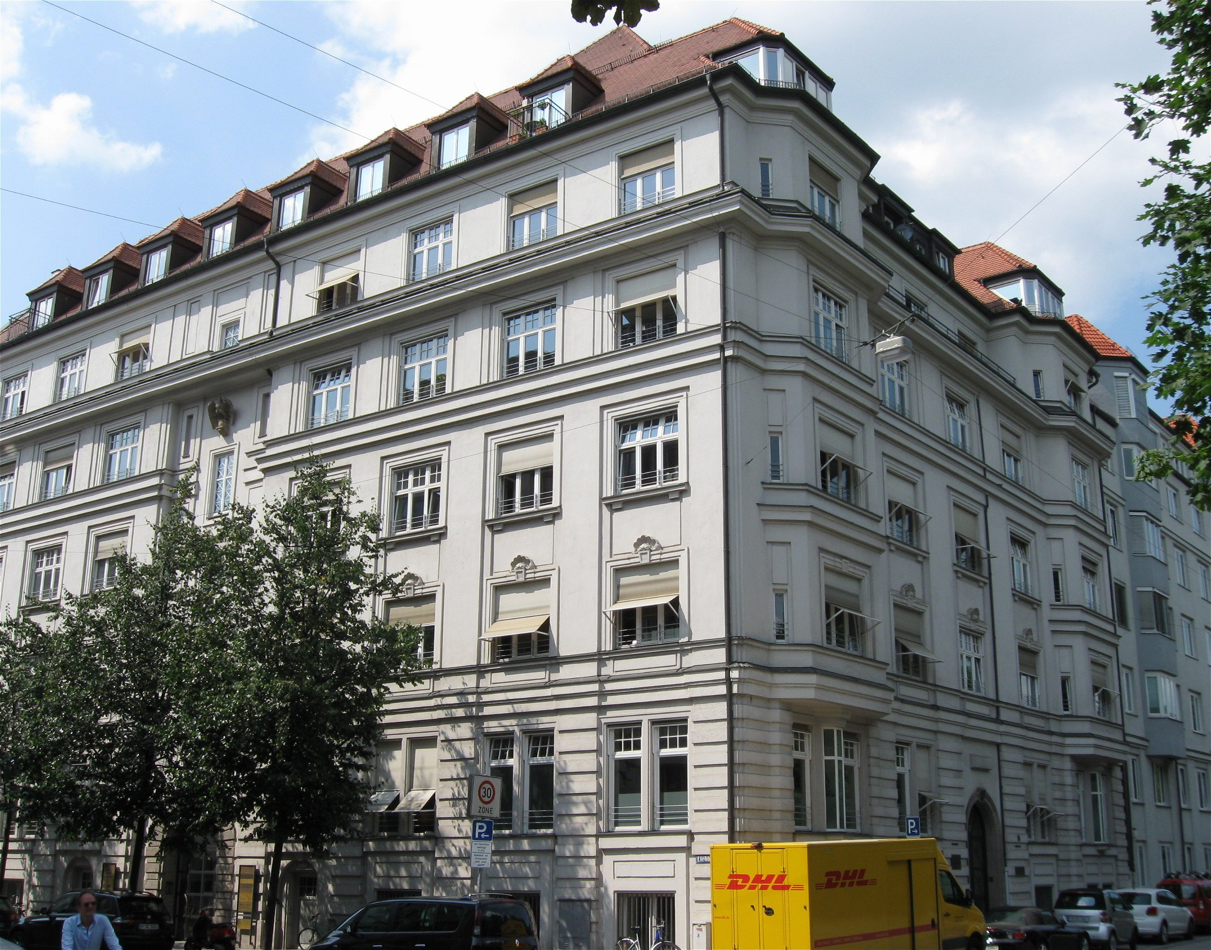 Eckhaus Widenmayerstraße 16 / Liebigstraße in München-Lehel; erbaut 1910–1911 nach Entwurf der Münchner Architekten Georg Meister und Oswald Bieber für die Versicherungsgesellschaft Thuringia AG; unter Denkmalschutz